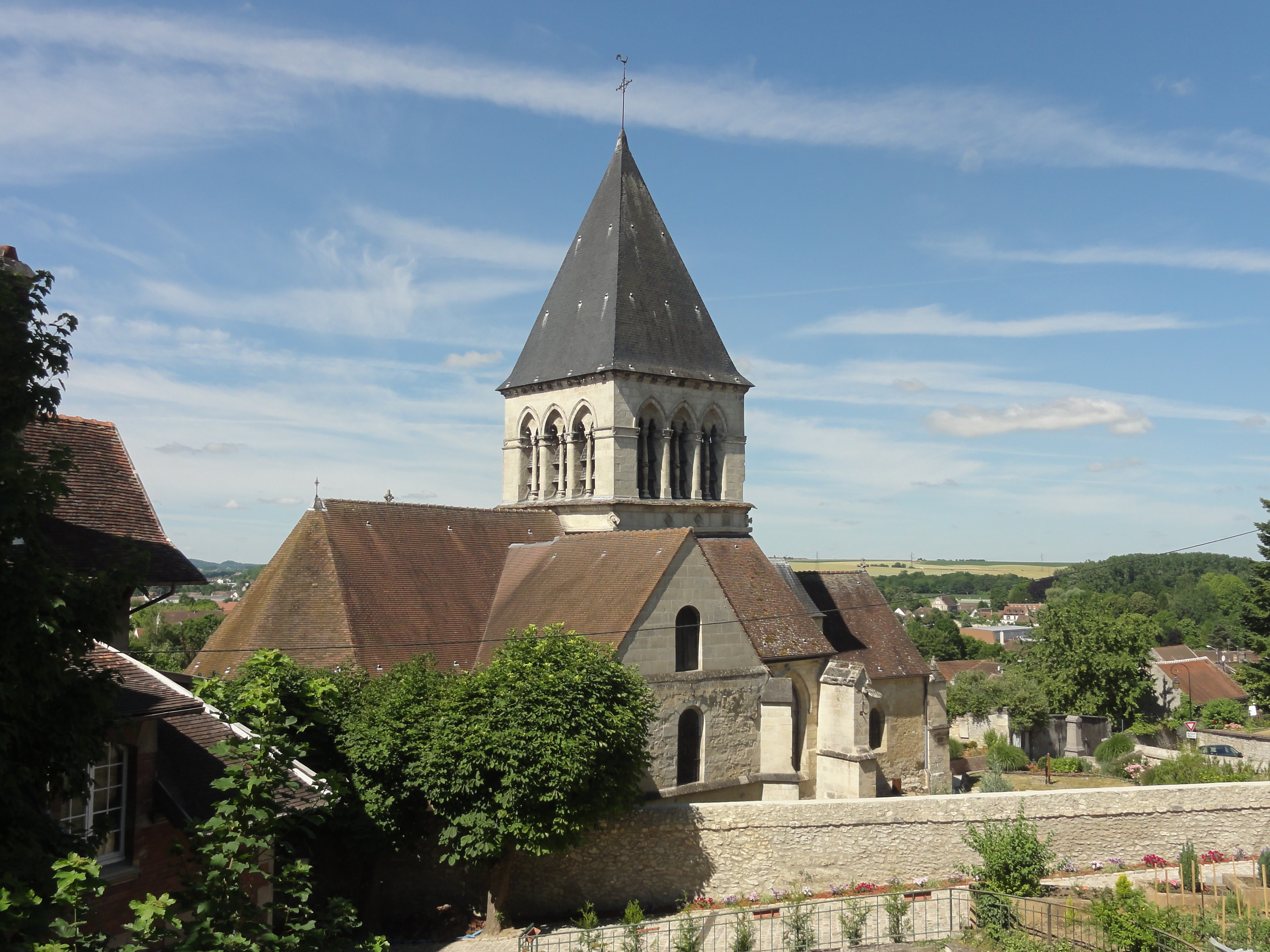 Église Saint-Étienne de Clairoix (voir titre).